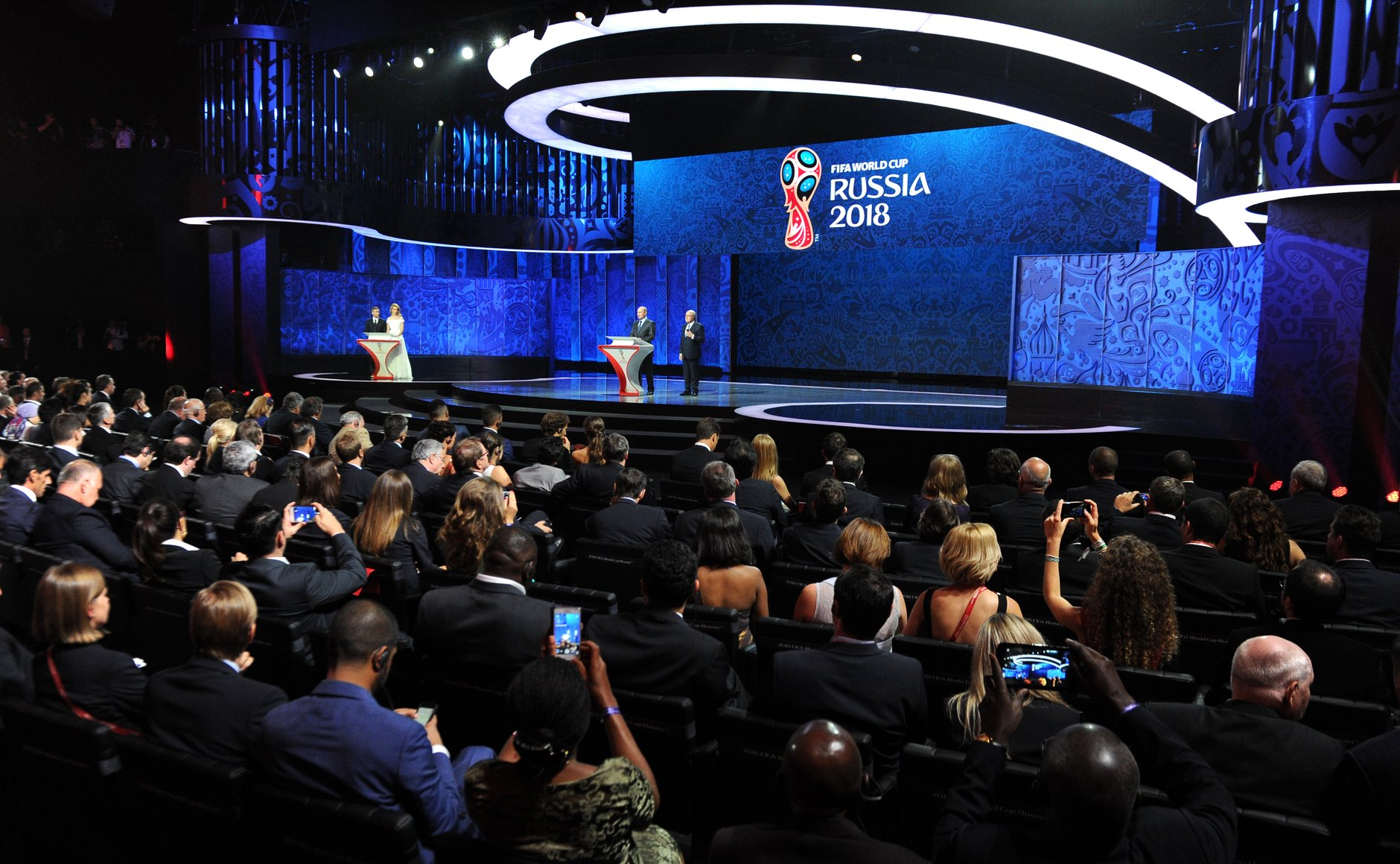 Предварительная жеребьёвка чемпионата мира по футболу 2018 года в Санкт-Петербурге.